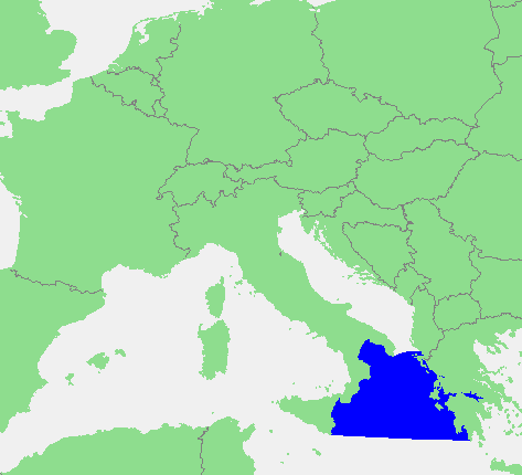 In dutch: Locatie Ionische Zee.PNG